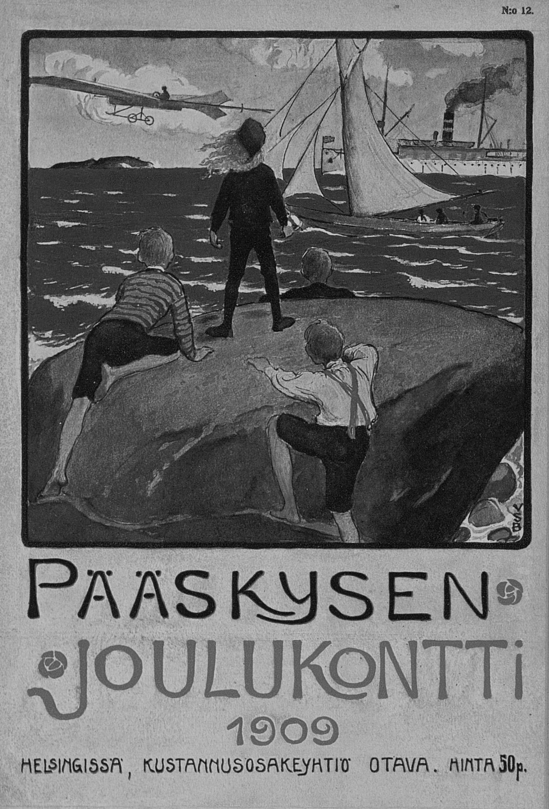 Lastenlehti Pääskynen no 12 01.12.1909